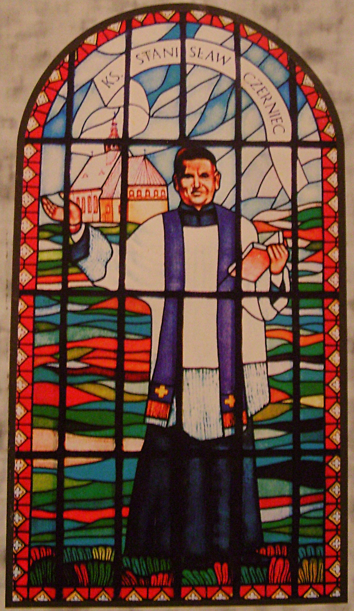 Wizerunek ks. Stanisława Czernieca na jednym z 22 witraży w kościele Imienia Maryi w Bączalu Dolnym.